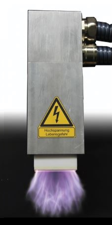 Beispiel eines Plasmaerzeugers um mittels Koronabehandlung Oberflächen zu reinigen.